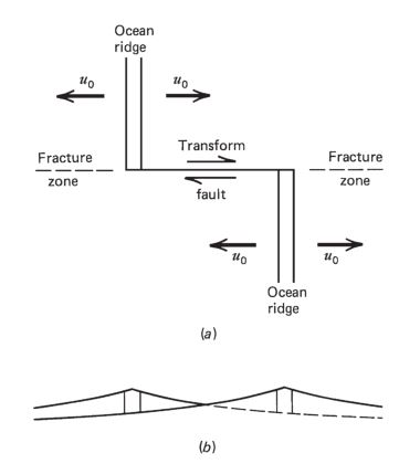 ini merupakan gambar tranform fault.